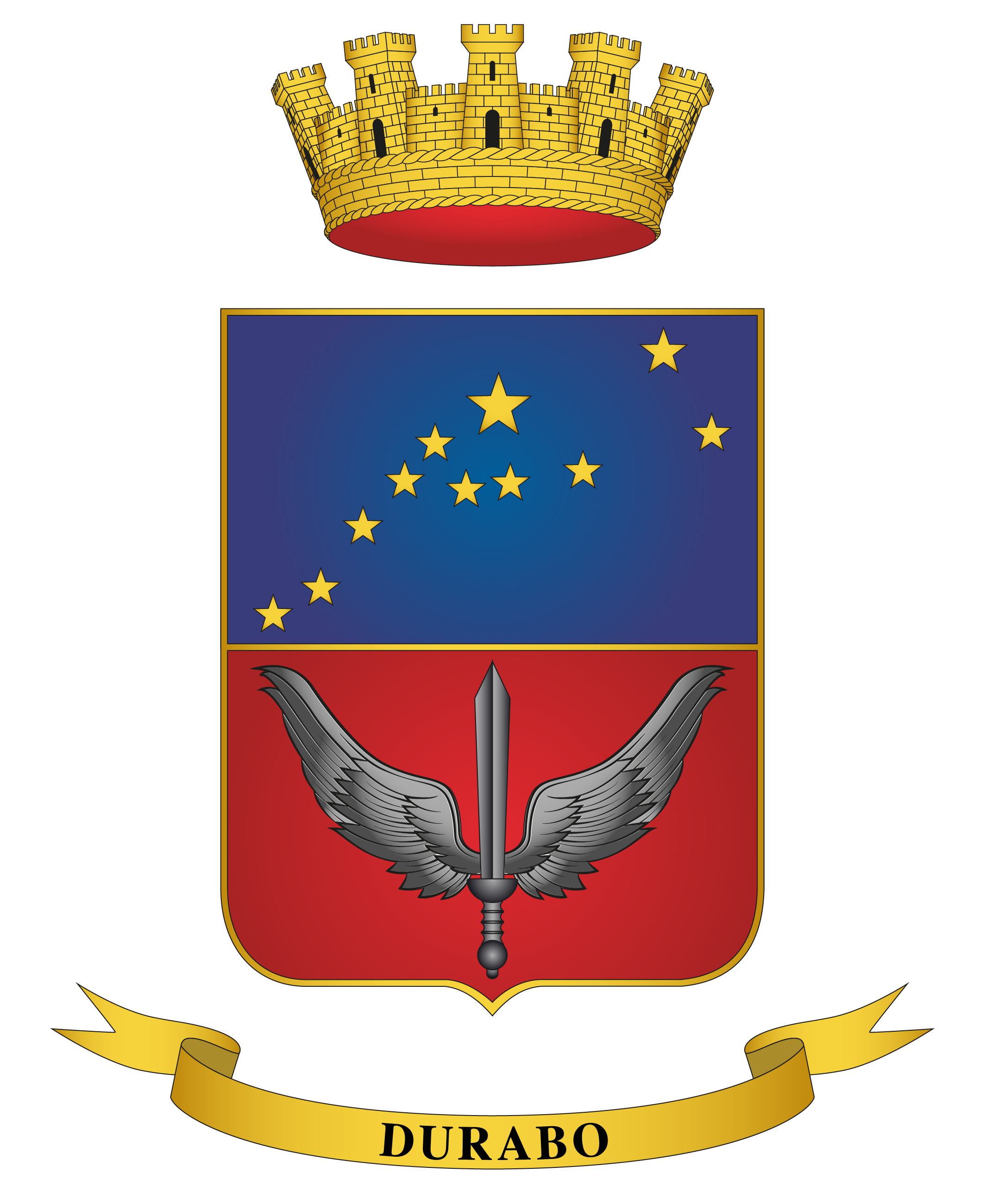 Stemma troncato: nel PRIMO, d'azzurro, alla rappresentazione della costellazione del Toro formata da undici stelle di cinque punte, la stella Aldebaran più grande, il tutto d'oro; nel SECONDO, di rosso, al volo d'argento, attraversato dal gladio postoin palo, con la punta all'insù, dello stesso. Lo scudo è sormontato dalla corona turrita, d'oro, degli Enti Militari. Sotto lo scudo, su lista bifida e svolazzante d'oro, il motto, in lettere maiuscole di colore nero, DURABO.